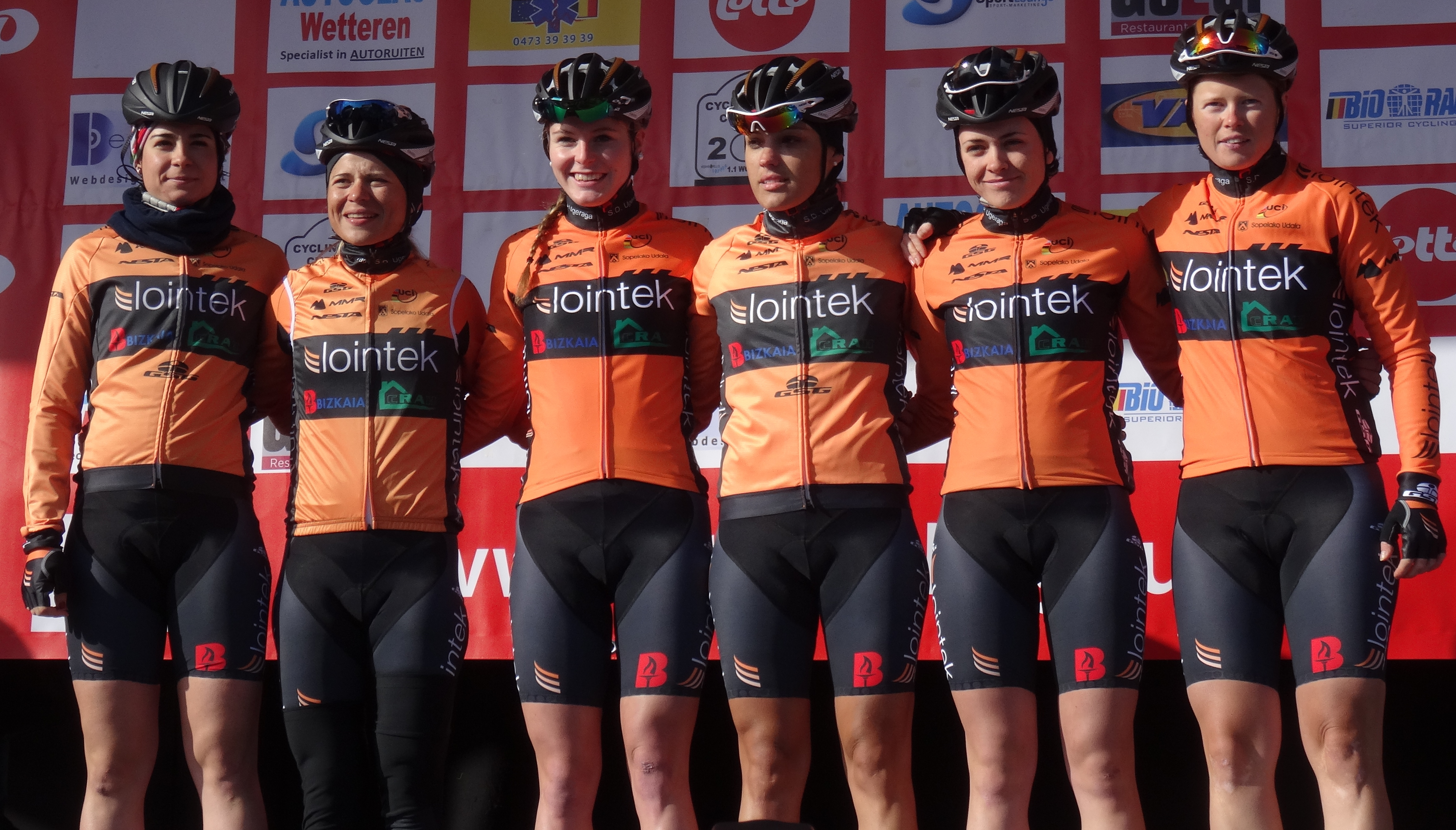 Reportage réalisé le mercredi 4 mars à l'occasion du départ du Samyn des Dames 2015 et du Samyn 2015 à Quaregnon, Belgique.